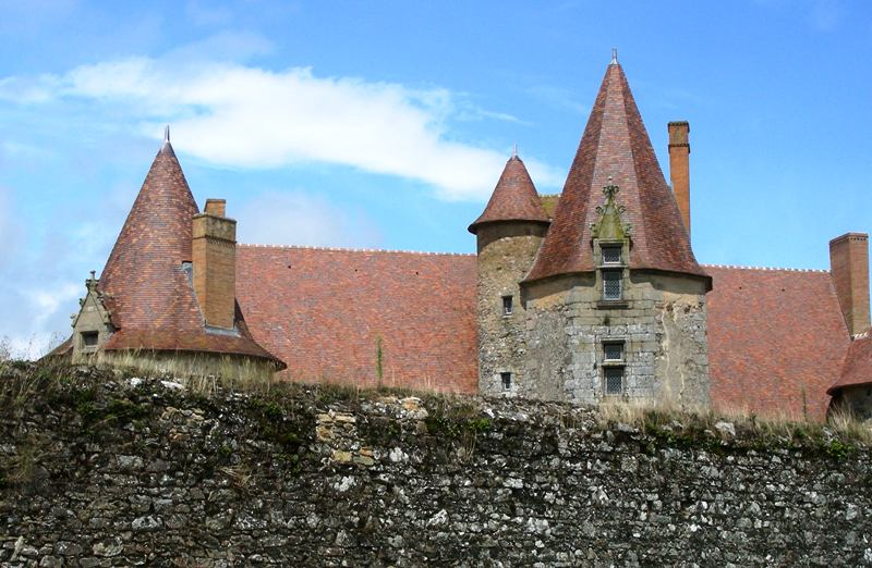 Château de La Chapelle-Bertrand